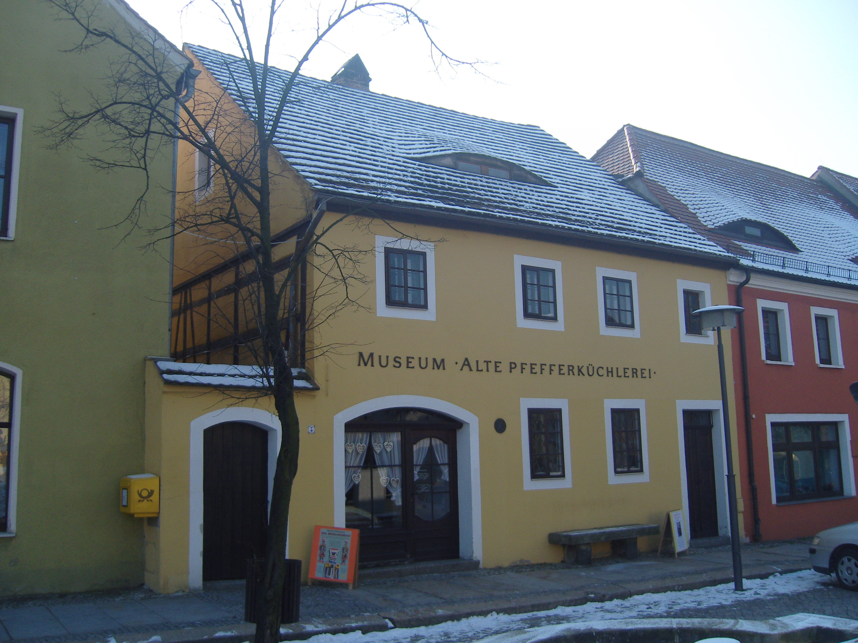 Museum Alte Pfefferküchlerei in Weißenberg, Sachsen